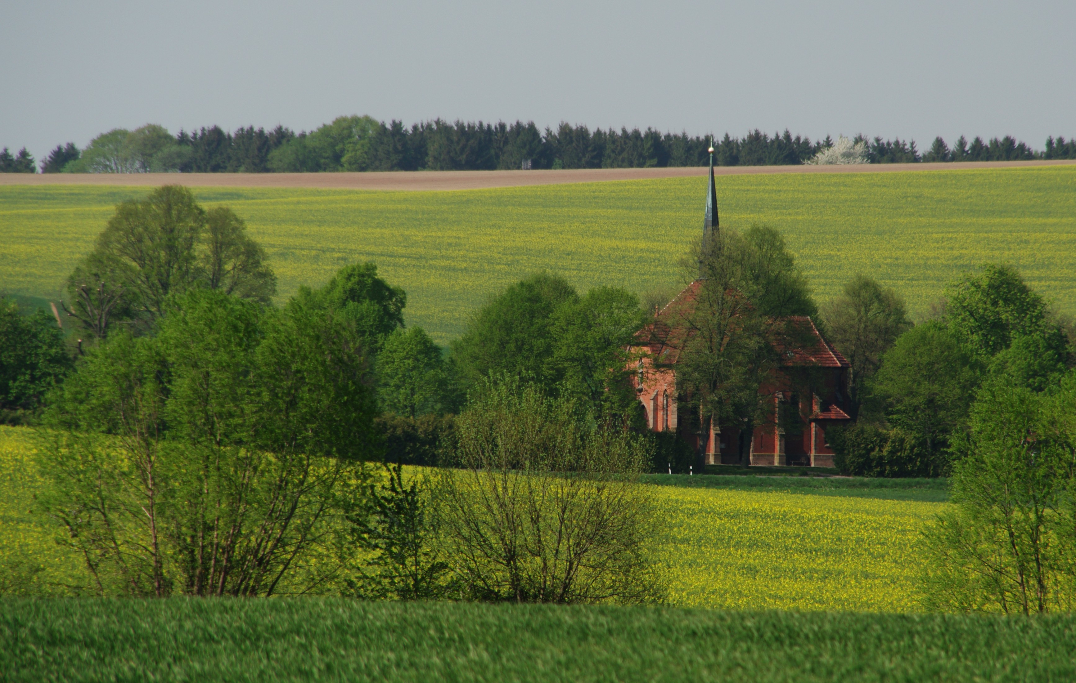 Die Wallfahrtskapelle Etzelsbach zwischen Steinbach und Hundshagen im Landkreis Eichsfeld.